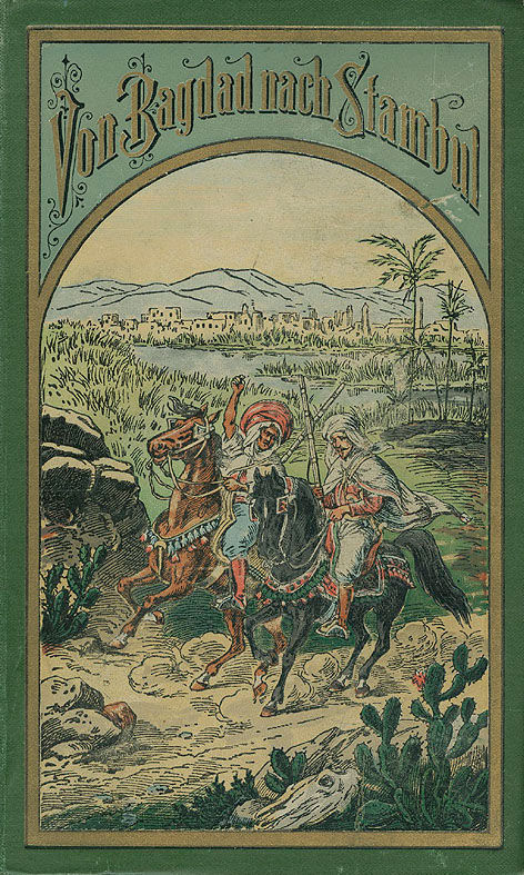 Buchdeckel der klassischen Ausgabe (ab 1892) der Erzählung Von Bagdad nach Stambul von Karl May.